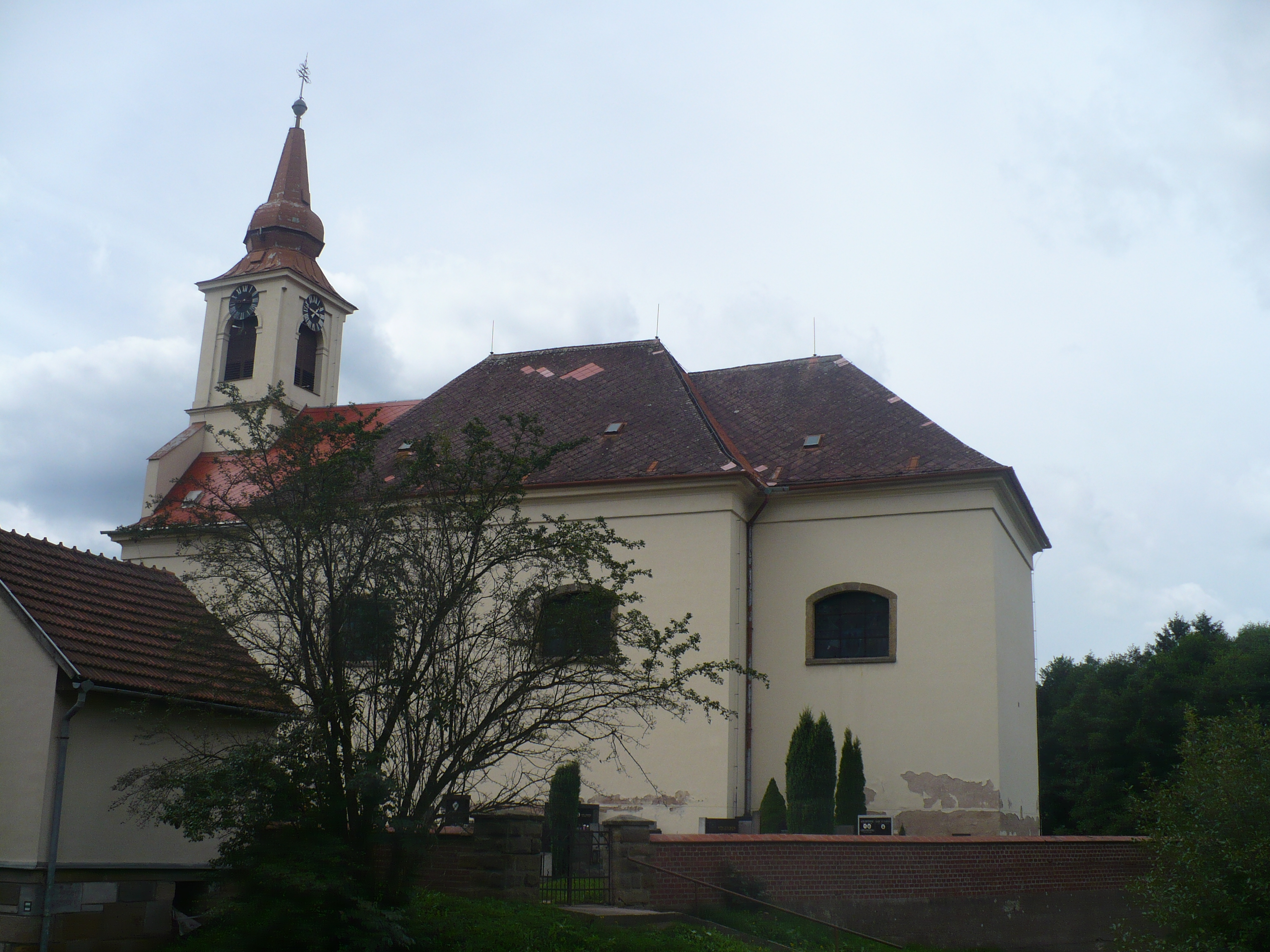 Kostel sv. Petra a Pavla v Rudolticích, hřbitov